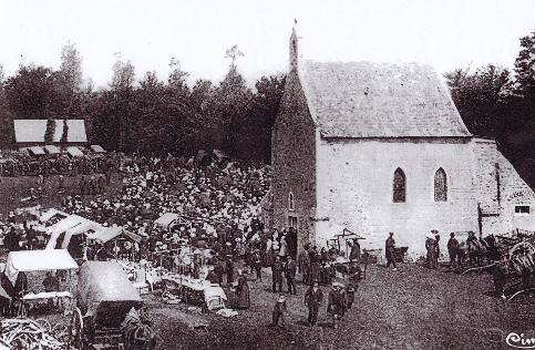 Chapelle Saint Ortaire au début du XXe siècle. (Manoir de Saint-Ortaire, 50620 Le Dézert, Normandie, France)